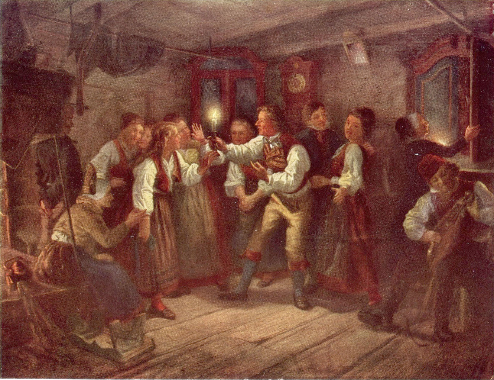 Domaredansen på Häverö. Oljemålning. Domaredansen återgiven av J. Malmberg är en kulturbild av stort intresse. Den är den enda kända folklivsbilden från Uppland med utpräglade sockendräkter. Och Häverö-dräkterna äro både vackra och intressanta. Den till höger i förgrunden sittande nyckel-harpospelaren förtjänar särskild uppmärksamhet. Nyckelharpan är nämligen numera att betrakta såsom ett speciellt uppländskt musikinstrument. Under äldre tider ägde det däremot vid utbredning. Nyckelharpan är känd från 1500-talet, men är möjligen äldre. - Greta Cederlund